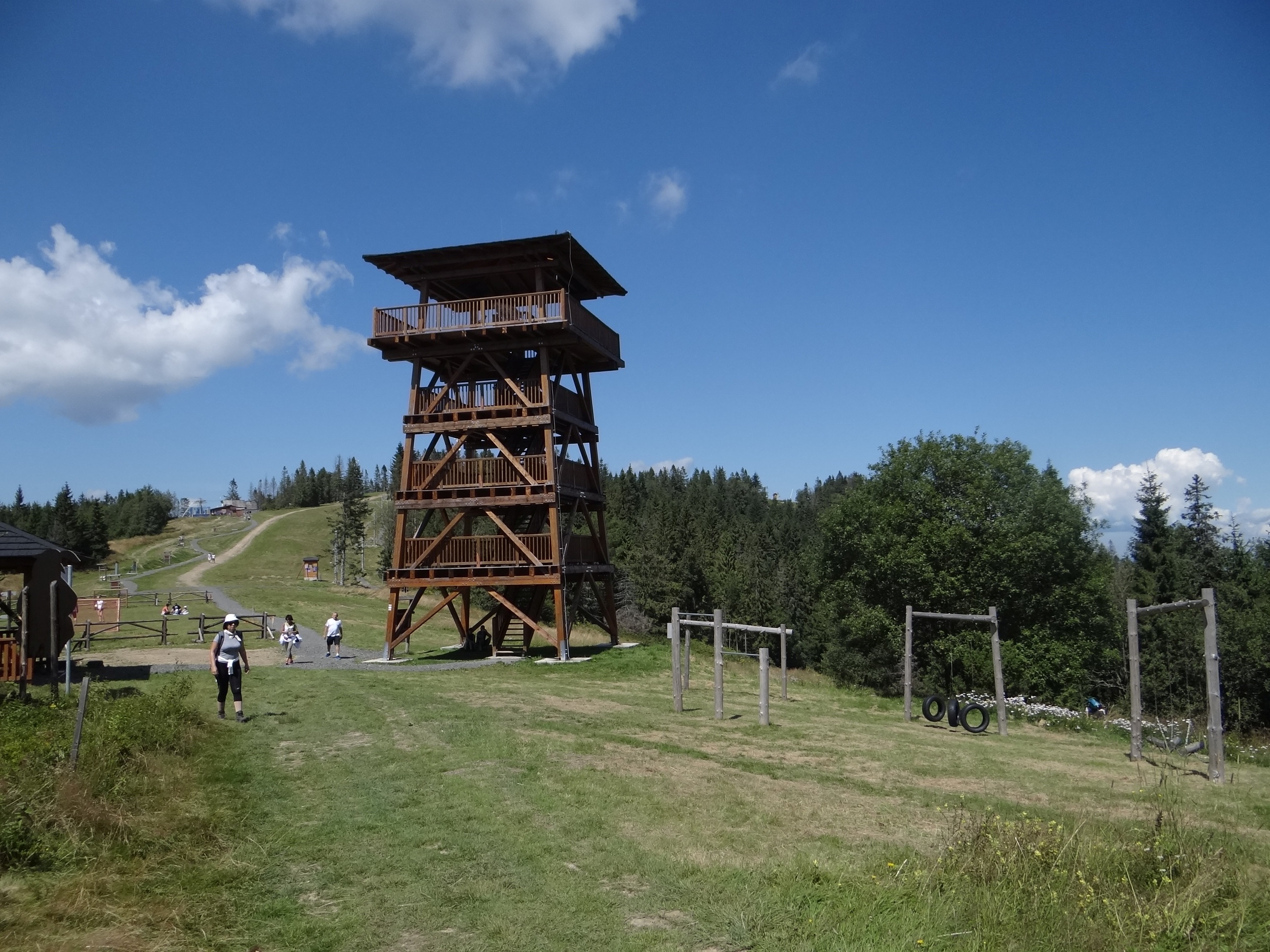 Wieża widokowa na zachodniej przełęczy pod Bukoviną